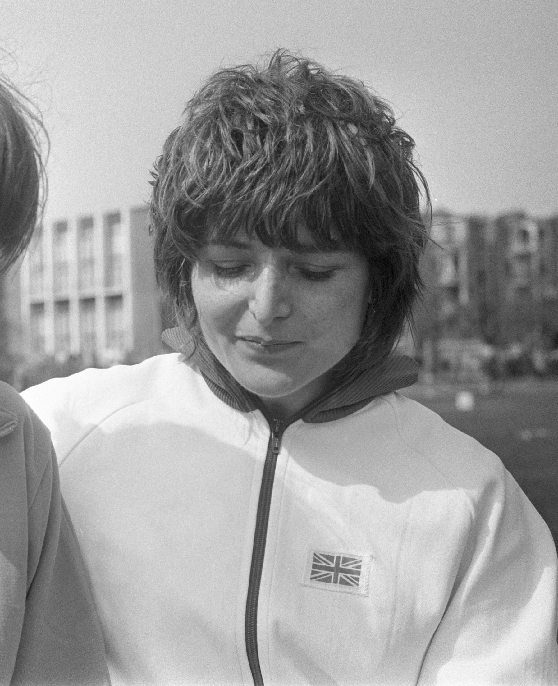 Dames atletiek Nederland tegen Engeland in Den Haag ; Sheila Cary 17 mei 1970